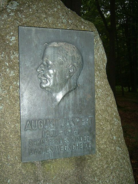 August Jaspert (*1871, † 1941 in Frankfurt am Main) war Lehrer und später Rektor, ehemaliger Stadtrat der Stadt Frankfurt am Main und der Gründer des Schullandheims Wegscheide. Tafel befindet sich in diesem Schullandheim.